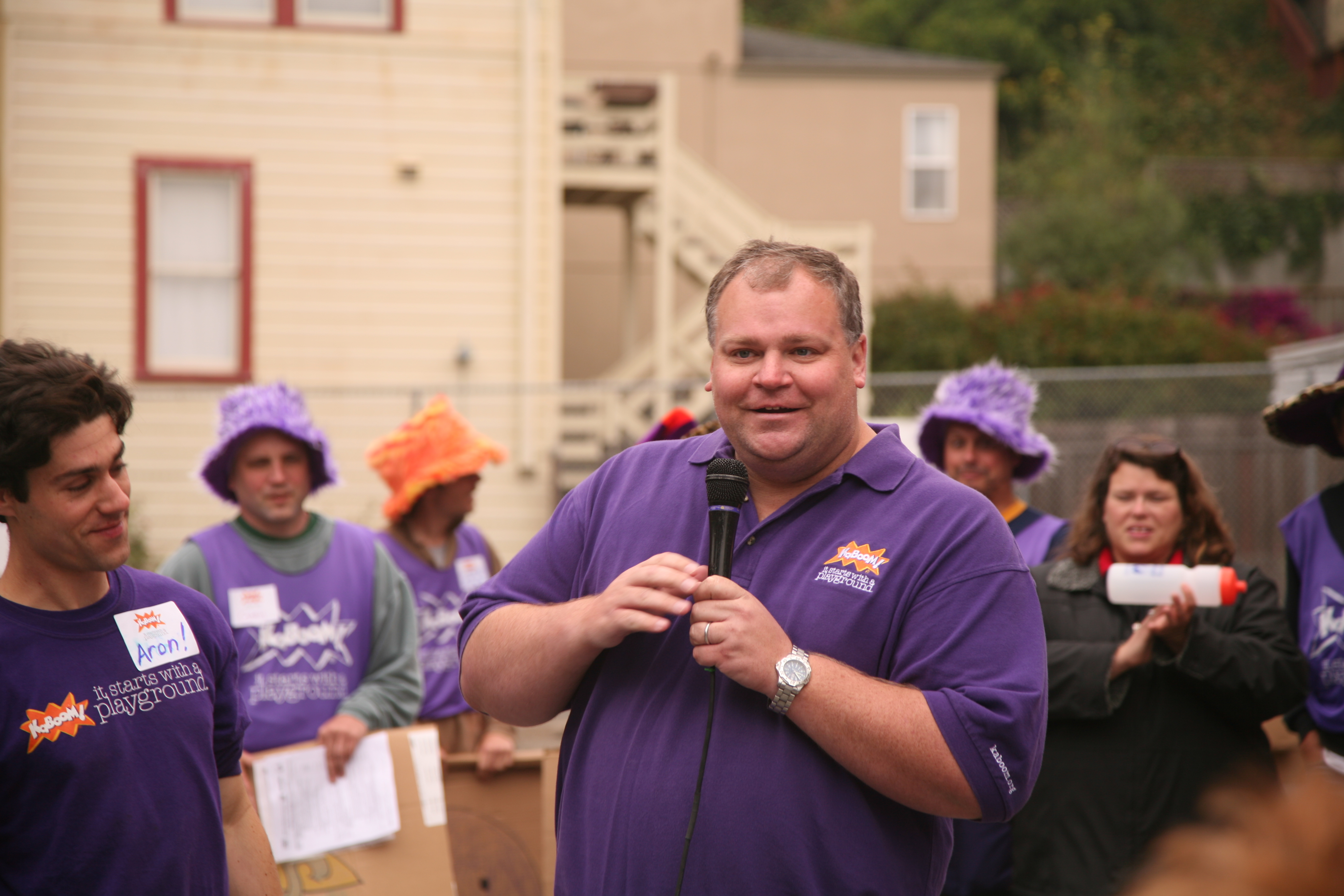 KaBOOM! CEO Darell Hammond